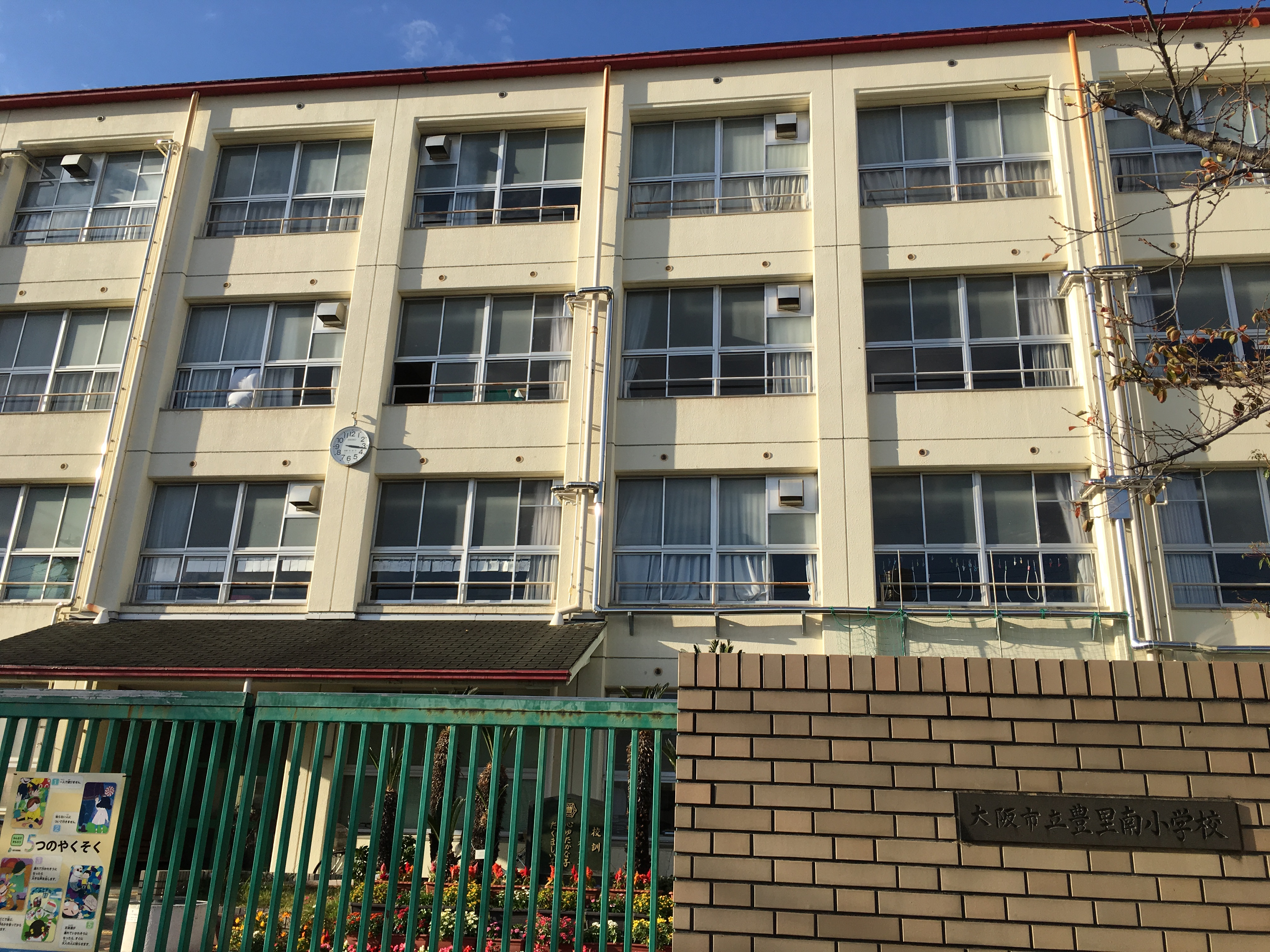 大阪市立豊里南小学校